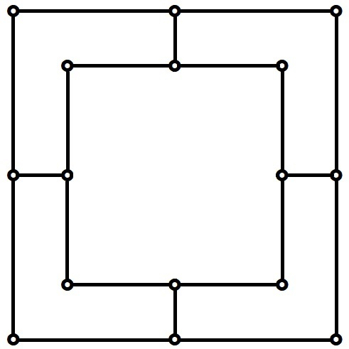 Igra sa 6 figura